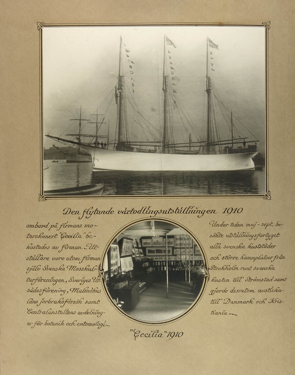 Depicted person: utställningsfartyg Cecilia